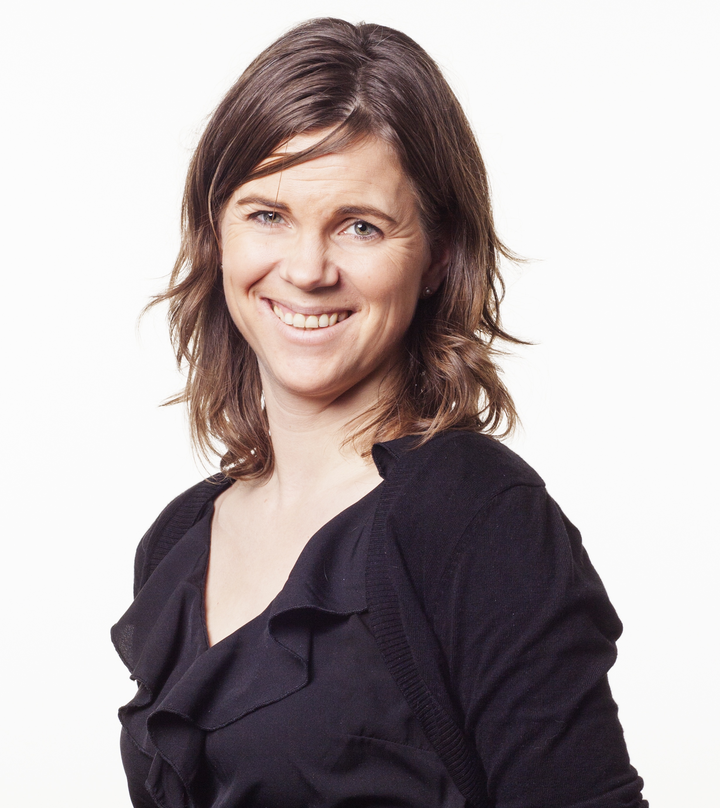 Leder av Akershus Venstre. Fotografert på rikspolitisk nettverk i desember 2012. Foto: Silje England Garshol